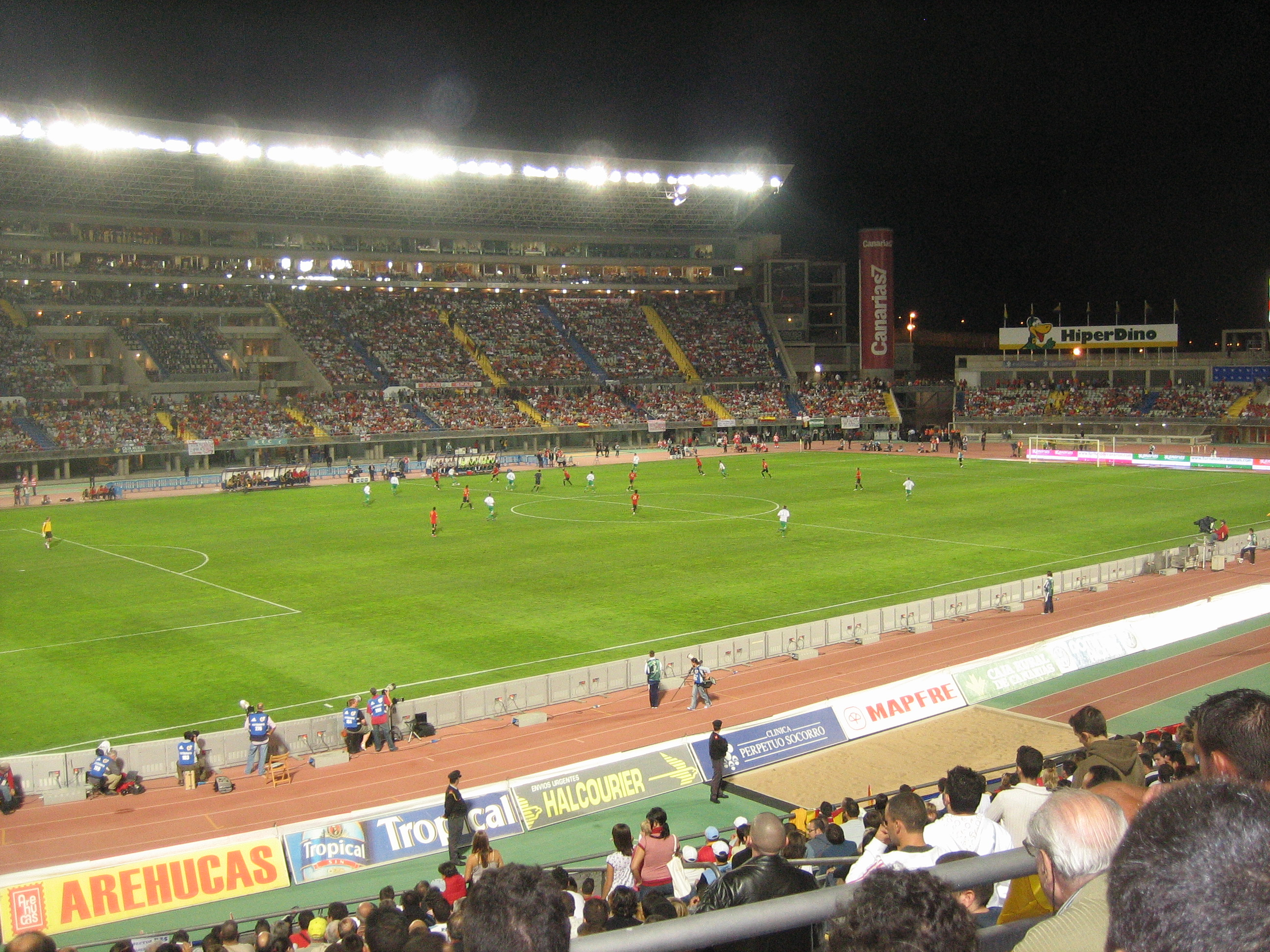 Partido clasificatorio para la Eurocopa'08 entre España e Irlanda del Norte, en el Estadio de Gran Canaria.